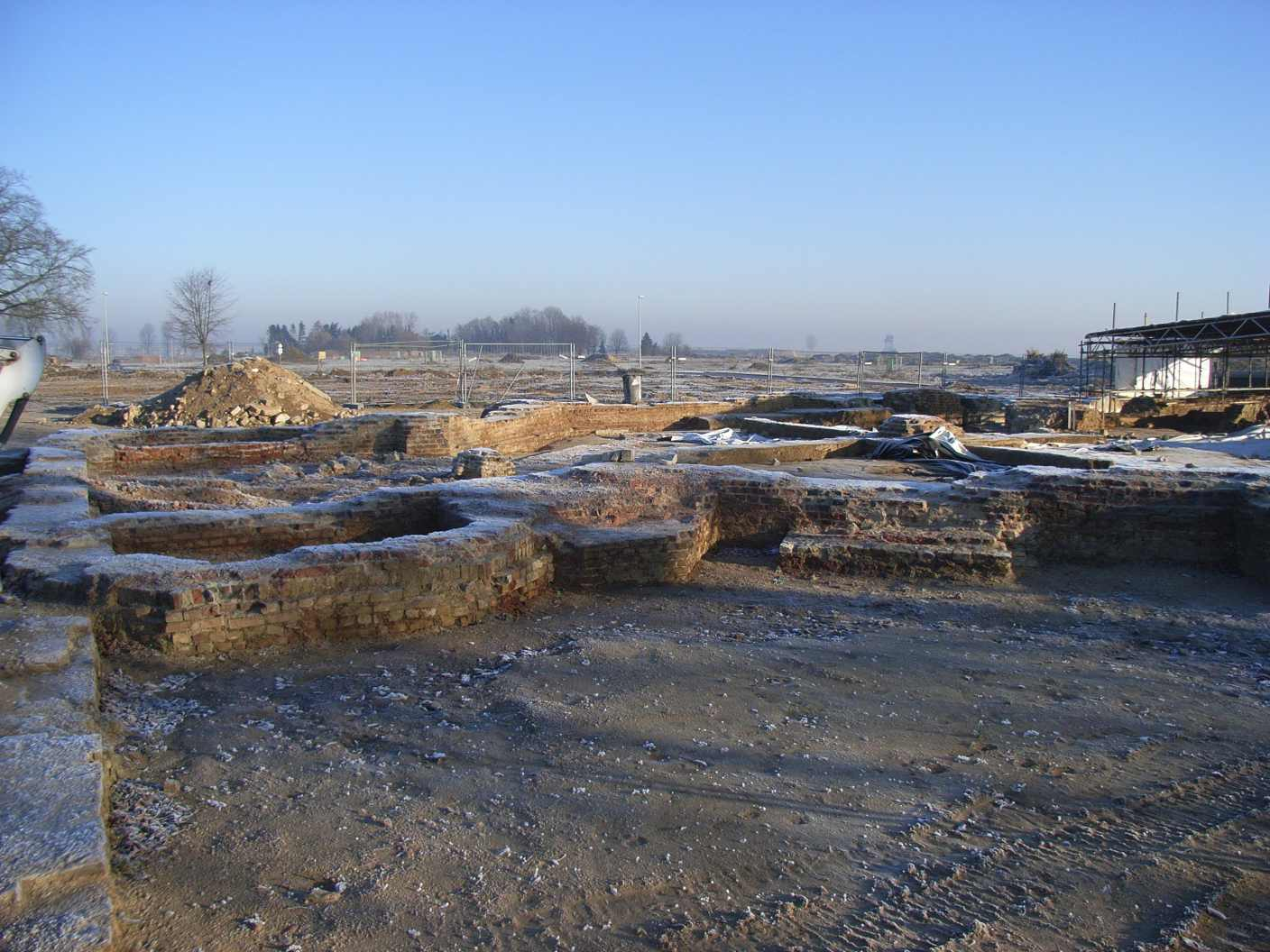 Fundamente der ehemaligen kath. Pfarrkirche Otzenrath (Jüchen)